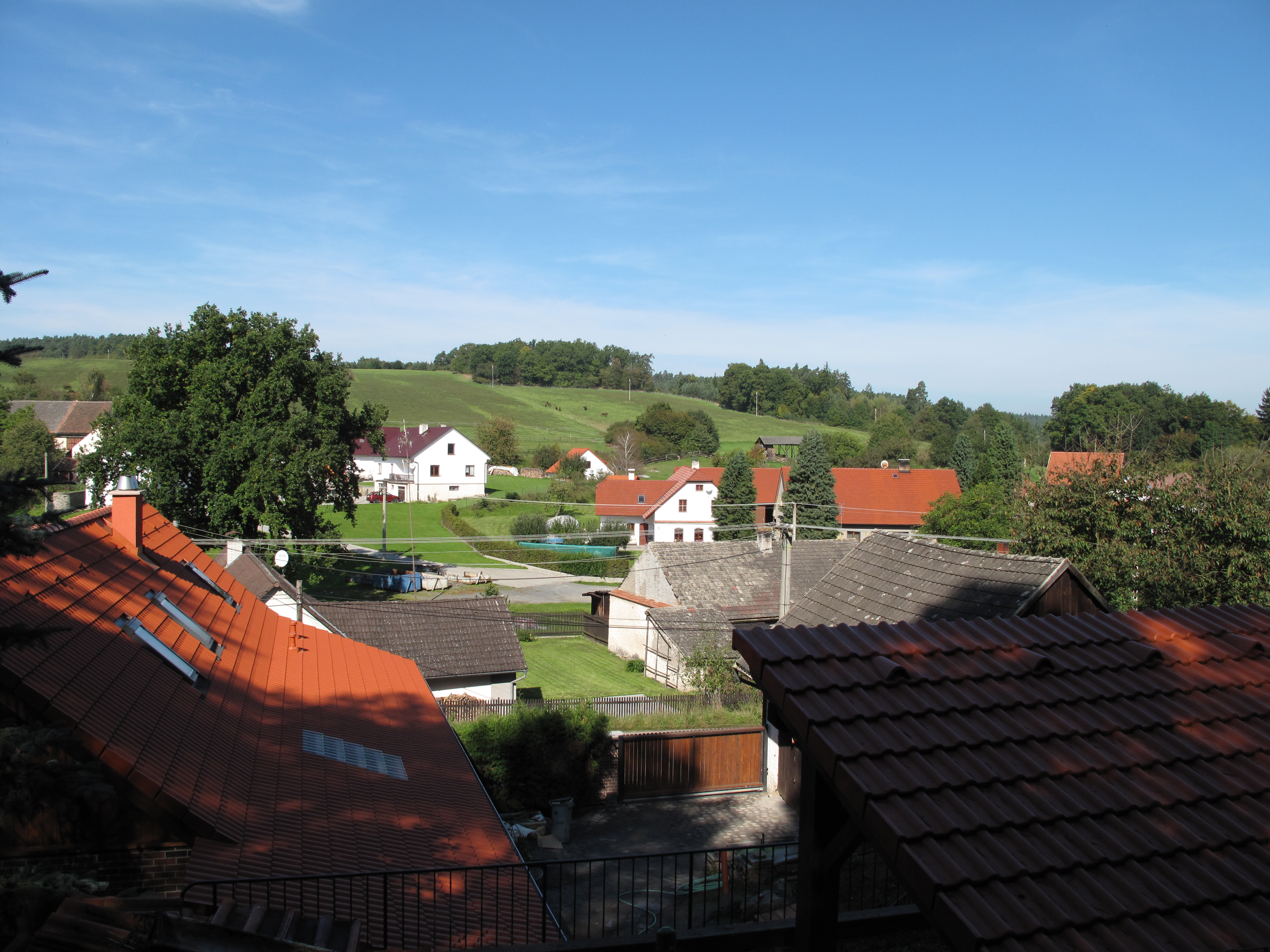 Střechy v Oušticích. Okres Benešov, Česká republika.